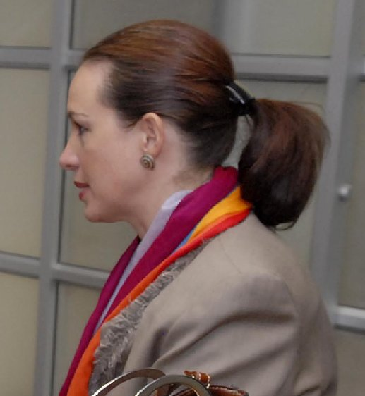 Fernanda Espinosa, Ministra de Relaciones Exteriores de Ecuador. Recibiendo a Cristina Fernández de Kirchner quien no aparece en la foto.